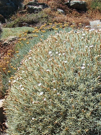 Centaurea horrida from Capo Falcone, Sardinia, Italy